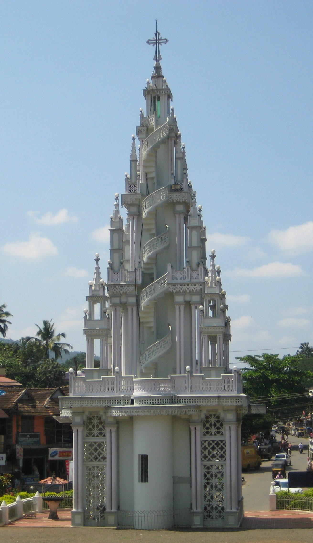 കൃസ്ത്യൻ പള്ളിയുടെ കീഴിലുള്ള ചെറുആരാധനാലയങ്ങളെയാണ് കപ്പേളയെന്ന് വിളിക്കുന്നത്. കപ്പേളയെന്ന പദത്തിന്റെ ഉല്പത്തി ലത്തീൻ ഭാഷയിൽ നിന്നാണ്. ചില സ്ഥലങ്ങളിൽ ഇതിനെ കുരിശടിയെന്നും കുരിശുപള്ളിയെന്നും പറയാറുണ്ട്. പ്രധാനപ്പെട്ട ആരാധനകൾ നടക്കുന്നത് പള്ളികളിലാണെങ്ങിലും ചുരുക്കം ചില സന്ദർഭങ്ങളിൽ ചില ആരാധനകൾ കപ്പേളകൾ കേന്ദ്രികരിച്ചും നടത്താറുണ്ട്. കപ്പേളകളിൽ ചെറിയ പ്രാർത്ഥനകളും നൊവേനകളുമാണ് ഉണ്ടാകാറുള്ളതെങ്ങിലും പ്രധാനപ്പെട്ട സമയങ്ങളിൽ, പെരുന്നാളിനോടനുബദ്ധിച്ചോ മറ്റോ, പ്രത്യേകം ക്രമീകരിച്ച അൾത്താരയിൽ കുർബ്ബാനയും ഉണ്ടാകാറുണ്ട്. പള്ളികളുടെ മുൻപിൽ തന്നെ മിക്കവാറും കപ്പേളകൾ ഉണ്ടാകാറുണ്ട്. അല്ലെങ്ങിൽ കവലകൾ കേന്ദ്രികരിച്ചും കപ്പേളകൾ പണിയുന്ന രീതി നിലവിലുണ്ട്. രാമപുരം പള്ളിയുടെ (പാല, കോട്ടയം) മുൻപിലുള്ള കപ്പേളയുടെ പടമാണിവിടെ ചേർത്തിരിക്കുന്നത്.